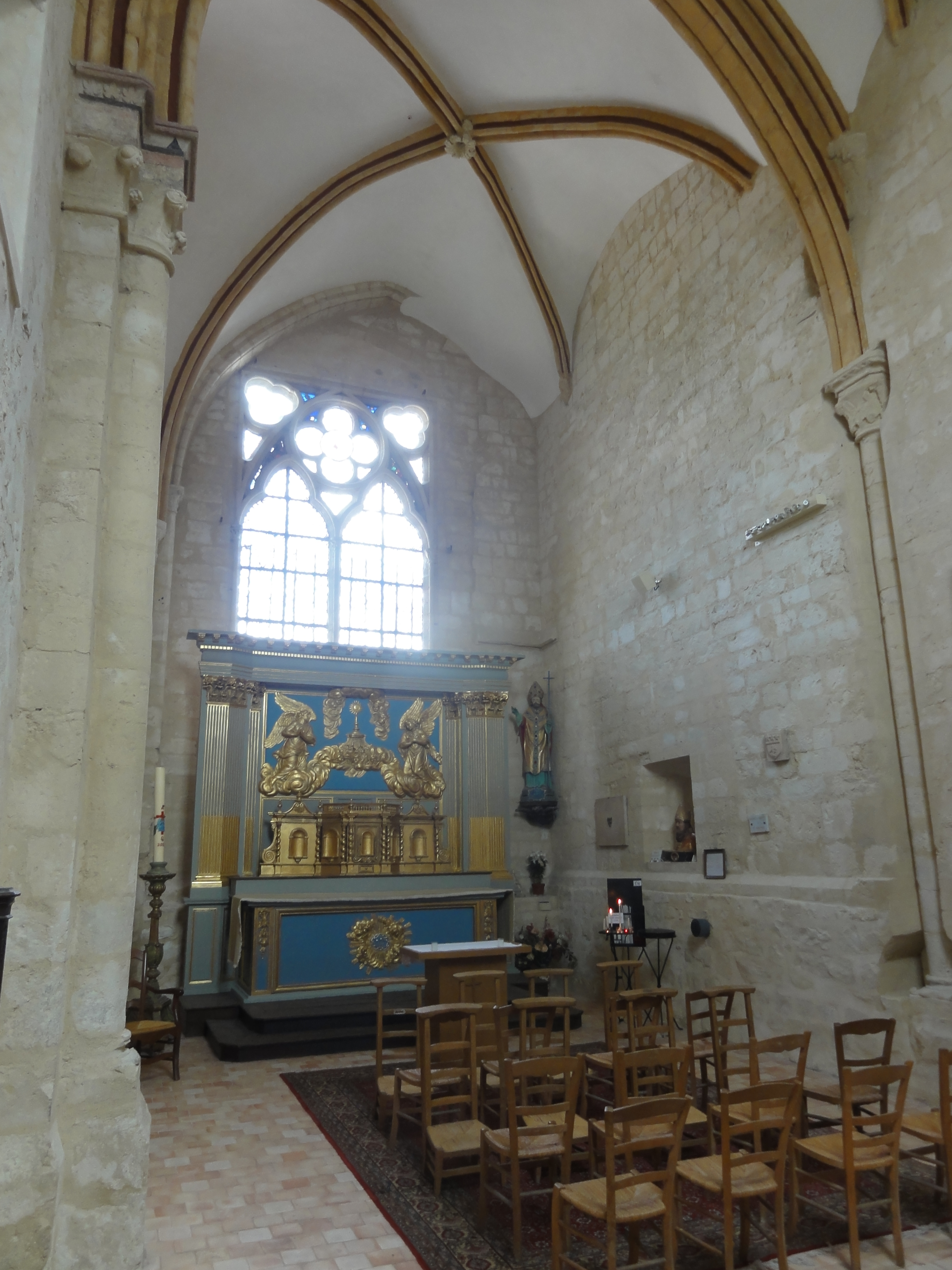 Chevet.